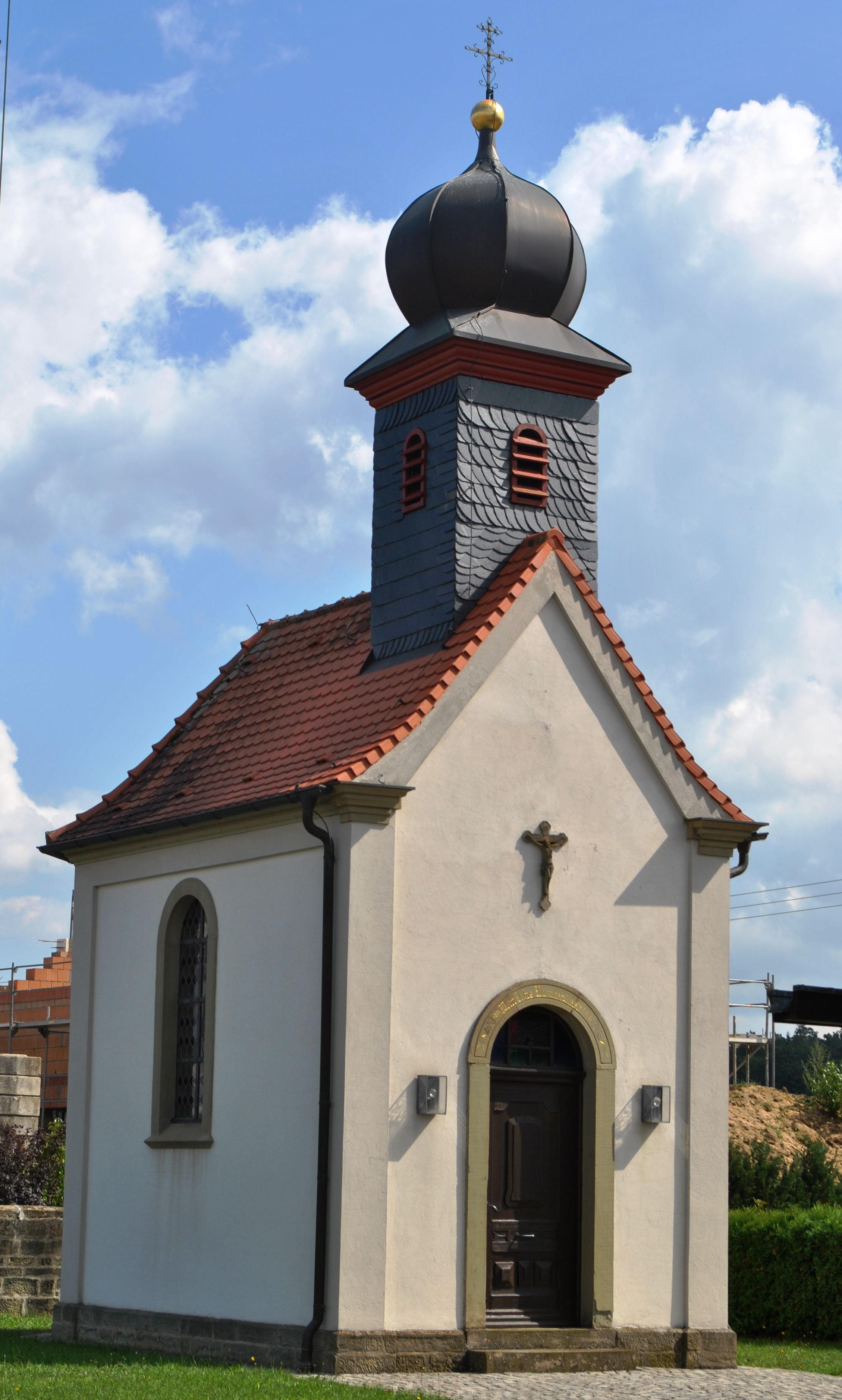 Kapelle mit polygonalem Chor und Dachreiter, 19. JahrhundertThis is a photograph of an architectural monument.